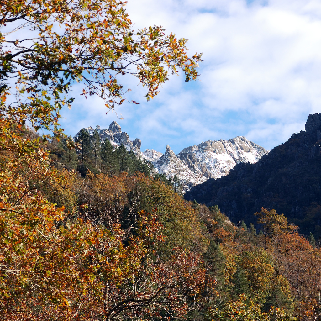 Mata da Albergaria, Gerês, Portugal [2006]